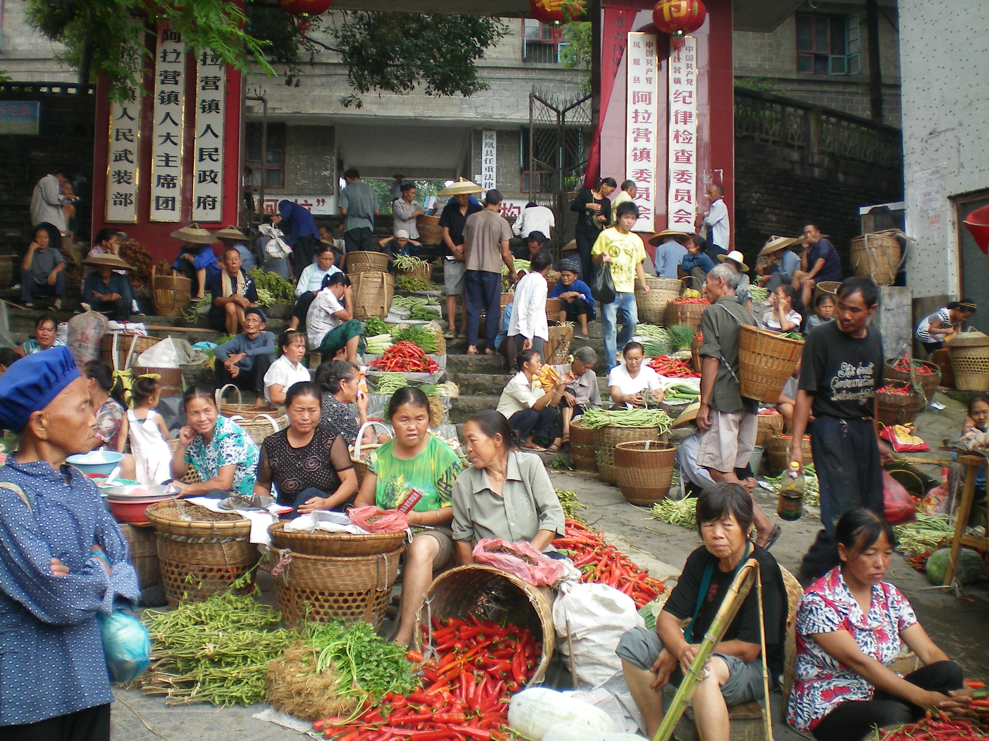 凤凰县阿拉营集市